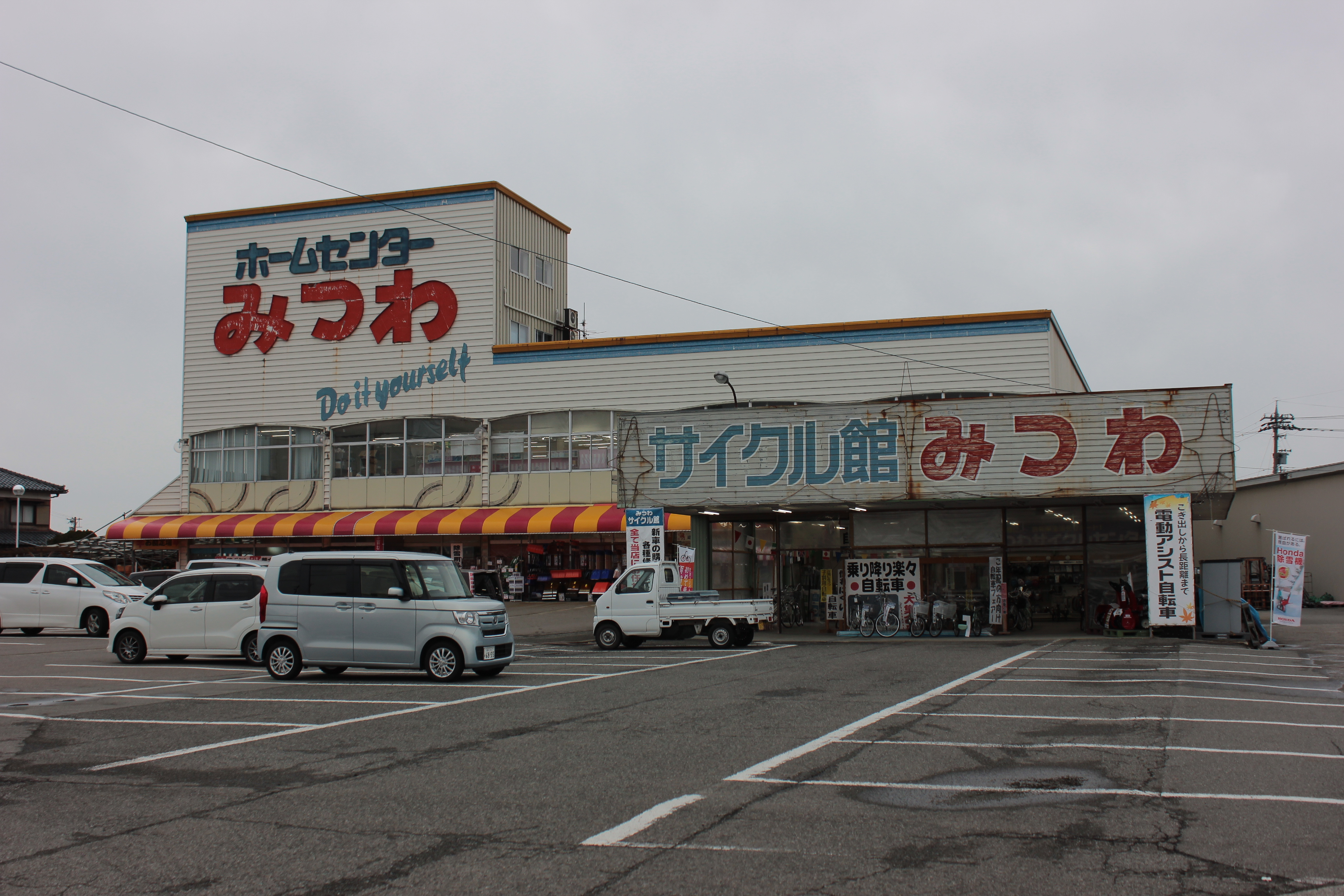 福井県福井市にあるホームセンターみつわ鷲塚店。同店が本社（本部）所在地となっている。 Canon EOS Kiss X5